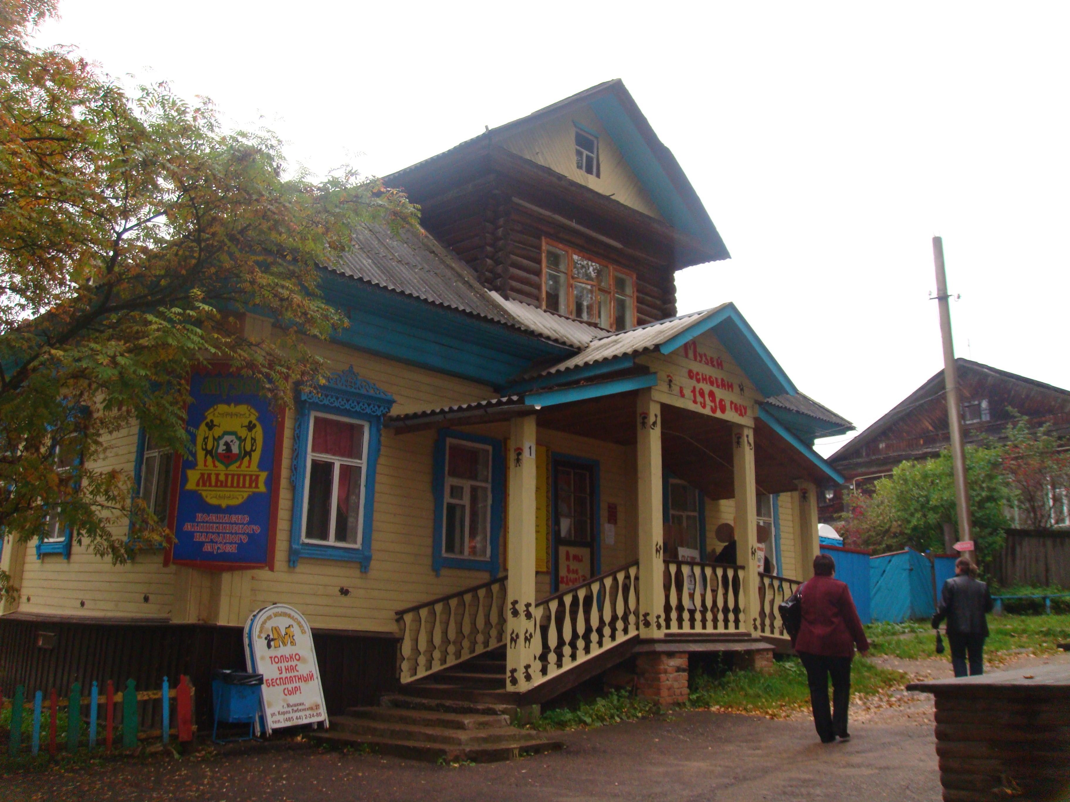 Музей мыши